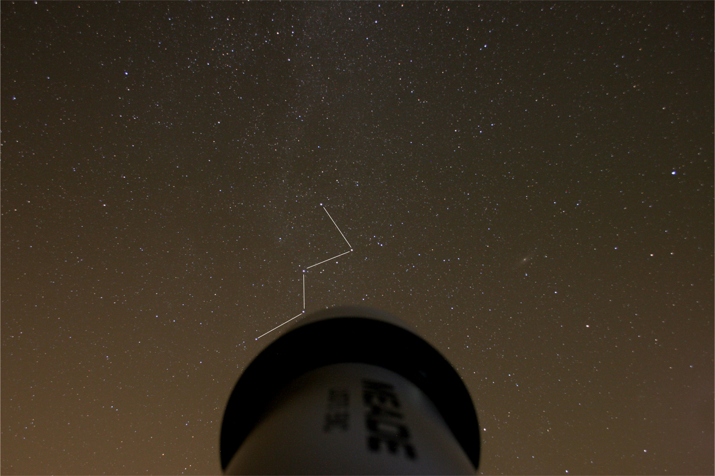 Cassiopeia, herkenbaar aan de M/W vorm. Vlak ernaast (rechts) de Andromedanevel. Foto: Chris Kuhl . ckuhl(at)xs4all.nl